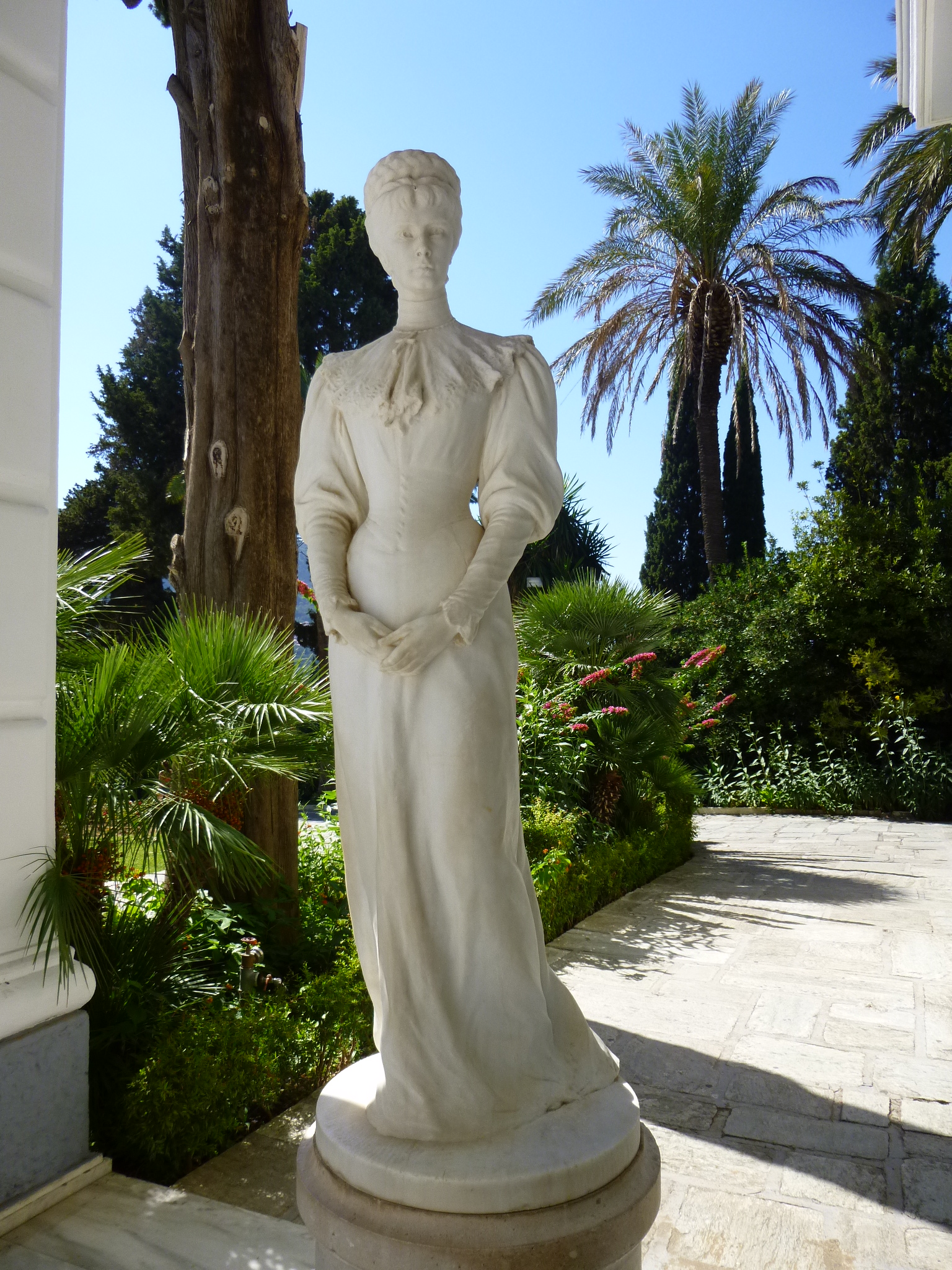 Sissy-Skulptur am Eingang des Schlosses; Korfu Stadt